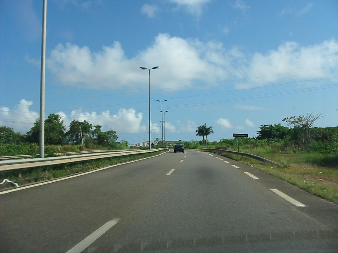 RN1 en direction du centre ville de Cayenne, Guyane. Source:Didwin